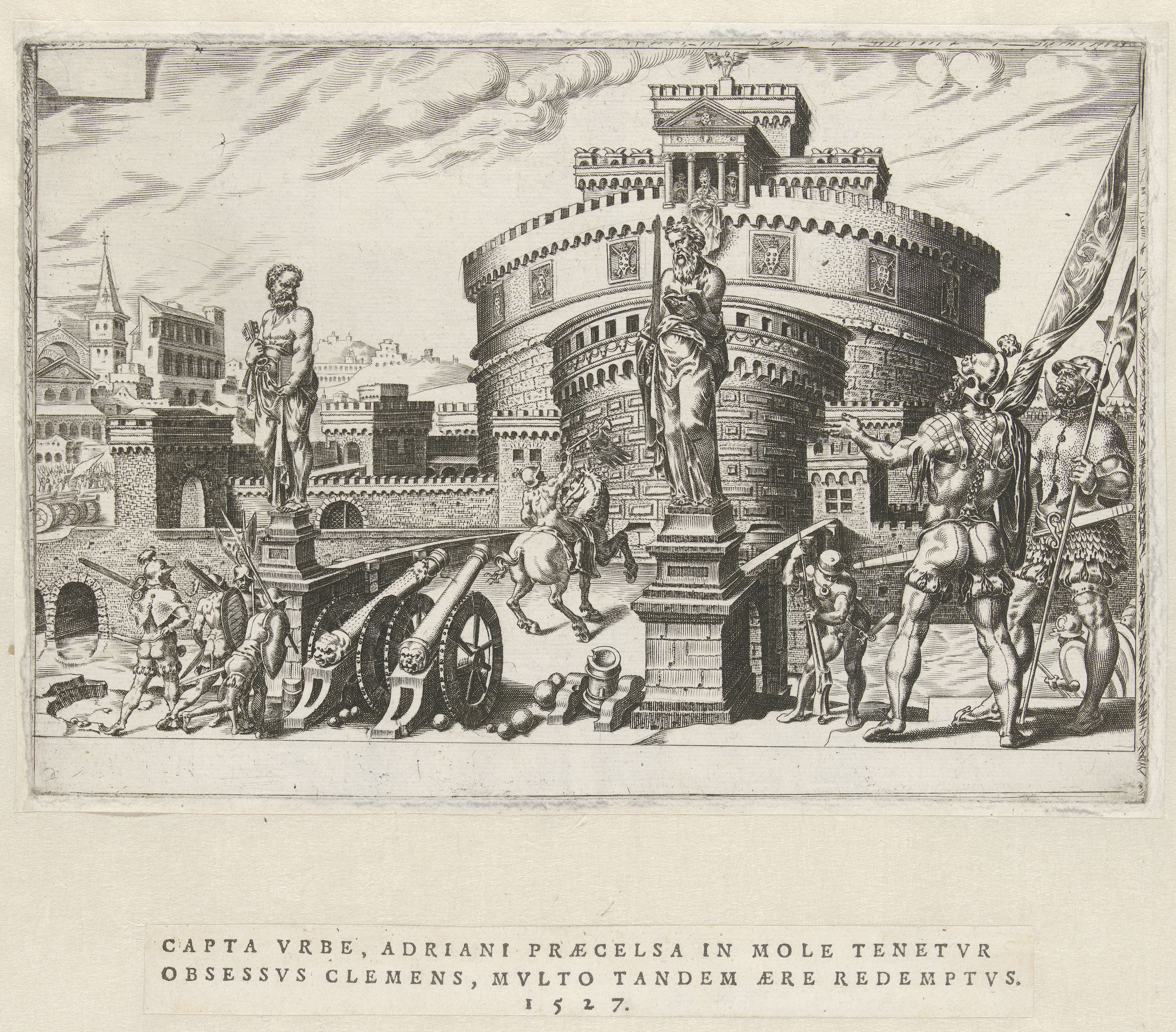 IdentificatieTitel(s): Belegering van de Engelenburcht, 1527Overwinningen van Karel V (serietitel)Divi Caroli. V. imp. opt. max. victoriae, ex multis praecipuae (serietitel)Objecttype: prent historieprent Objectnummer: RP-P-1950-201DCatalogusreferentie: New Hollstein Dutch 527-1(4)Opmerking: HeemskerckHollstein Dutch 219Riggs 116Opschriften / Merken: verzamelaarsmerk, verso midden onder, gestempeld: Lugt 2228Omschrijving: De belegering van de Engelenburcht in Rome (1527). Clemens VII kijkt vanuit de Engelenburcht naar de bezettingsmacht van Rome. Twee kanonnen op de voorgrond. Op de achtergrond de Tiber en de Engelenburcht. De prent maakt deel uit van een twaalfdelige serie over de overwinningen van Karel V. Hij heeft een aparte tekststrook met een Latijnse tekst.VervaardigingVervaardiger: prentmaker: Dirck Volckertsz. Coornhertnaar ontwerp van: Maarten van Heemskerckuitgever: Hieronymus CockPlaats vervaardiging: prentmaker: Haarlemnaar ontwerp van: Haarlemuitgever: AntwerpenDatering: 1555 - 1556Fysieke kenmerken: gravure en ets; boekdrukMateriaal: papier Techniek: etsen / graveren (drukprocedé) / boekdrukAfmetingen: plaatrand: h 155 mm × b 231 mmOnderwerpWat: firearms: cannonInname van RomeWanneer: 1527 - 1527Waar: EngelenburchtEngelenbrugWie: Karel V van Habsburg (Duits keizer en koning van Spanje)Clemens VIIVerwerving en rechtenVerwerving: aankoop 1950Copyright: Publiek domein